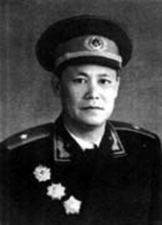 中文（中国大陆）: 陈德少将，中国人民解放军开国少将。